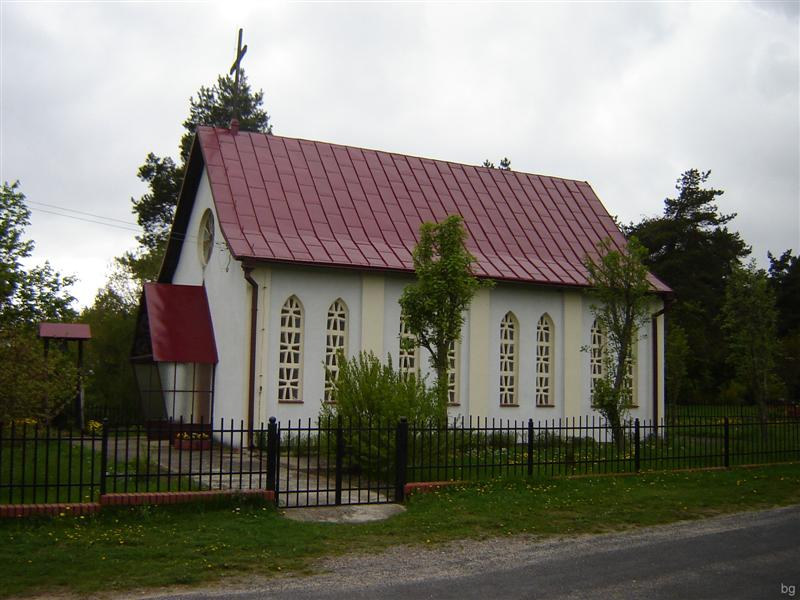 Sadkowo - rzymskokatolicki kościół filialny p.w. MB Częstochowskiej, 1985.